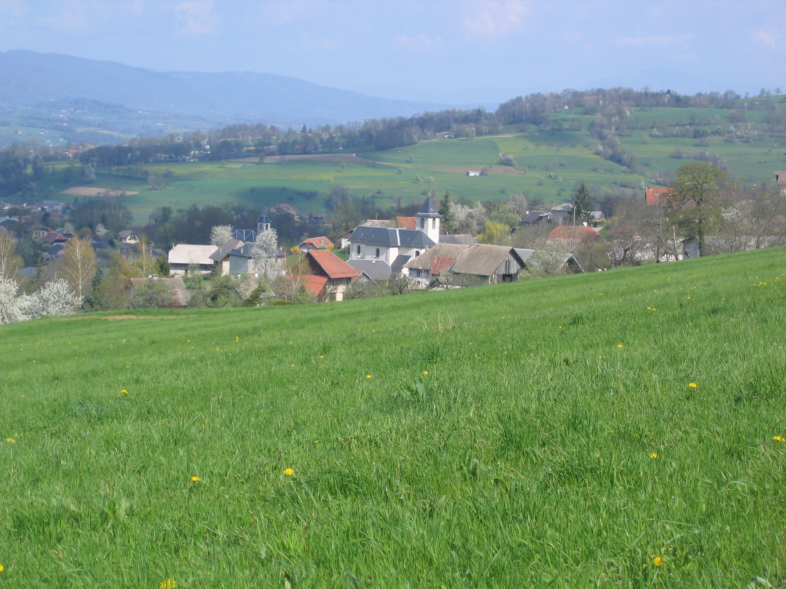 photo de Saint Offenge-Dessus avec Saint-Offenge-Dessous en contre-bas